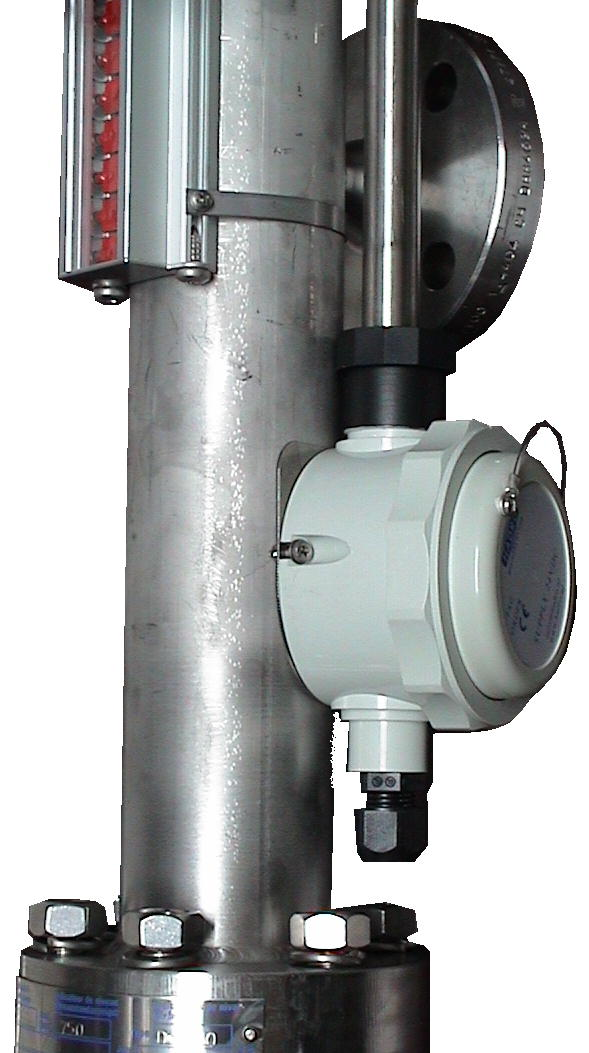 Magnetische peiltoestel met een analoge uitgang. Foto zelf gemaakt